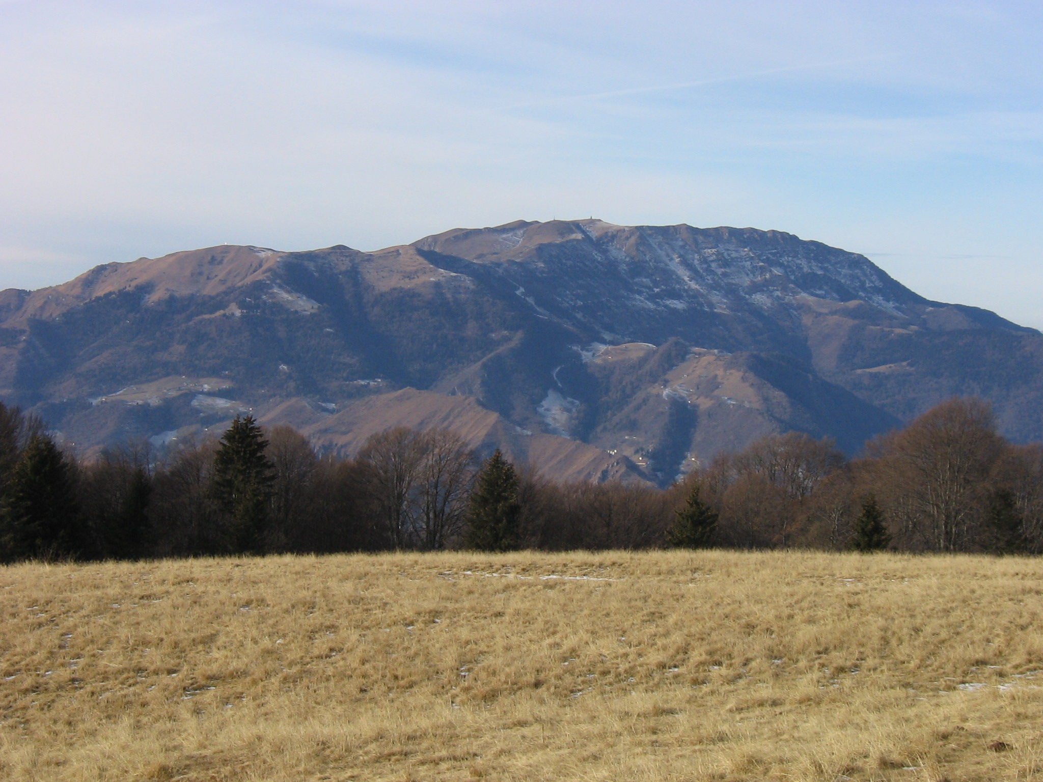 Monte Guglielmo (1967 m) visto dal Pian del Bene (m 1515) in Val TrompiaLumbaart: Al Gölem (1967 meter) vìst dal Pià dal Bé (1515 meter) en Val Trompia